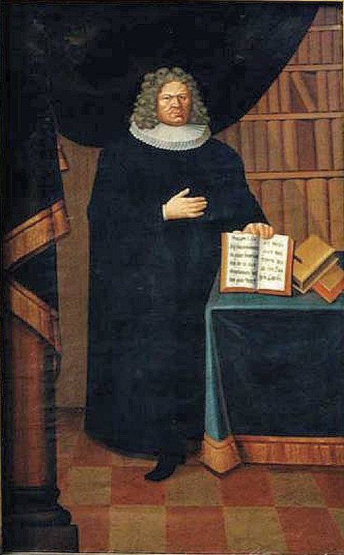 Theodor Pyl (1647 - 1723 in Greifswald) war ein deutscher Theologe und Physiker. Mitte des 18. Jahrhunderts mit angehängter Inschriftenkartusche. Im Dom St. Nikolai Greifswald.